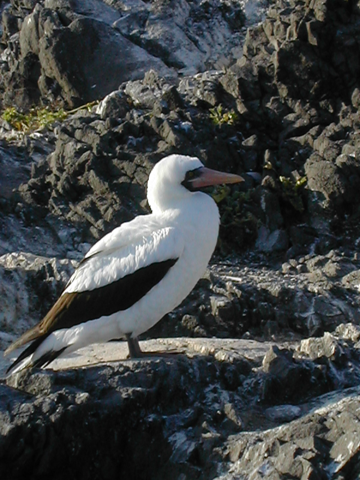 Sula granti